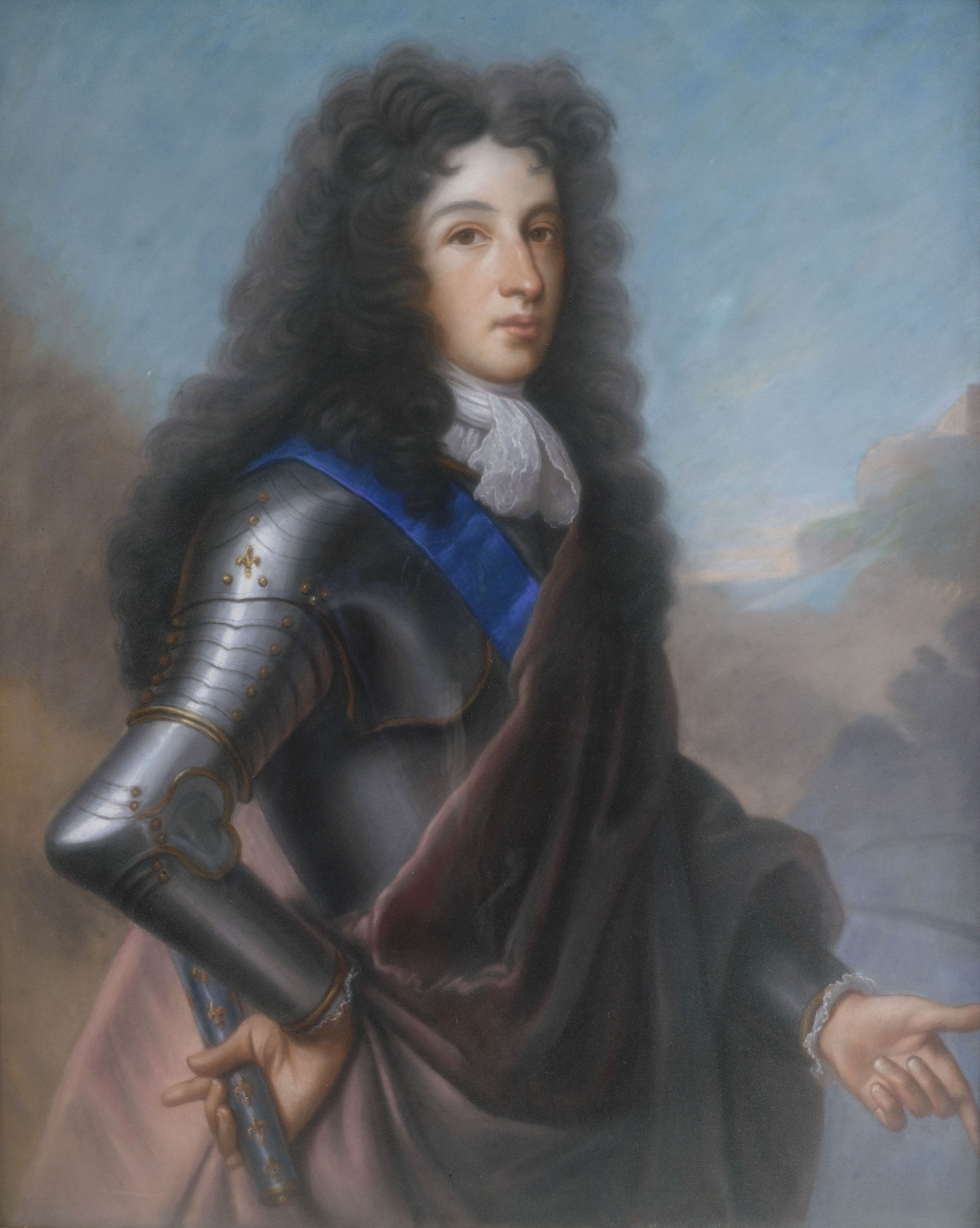 Portrait des Ludwig von Frankreich, Herzog von Burgund (1682-1712).